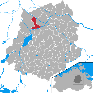 Warrenzin, Landkreis Demmin, Mecklenburg-Vorpommern